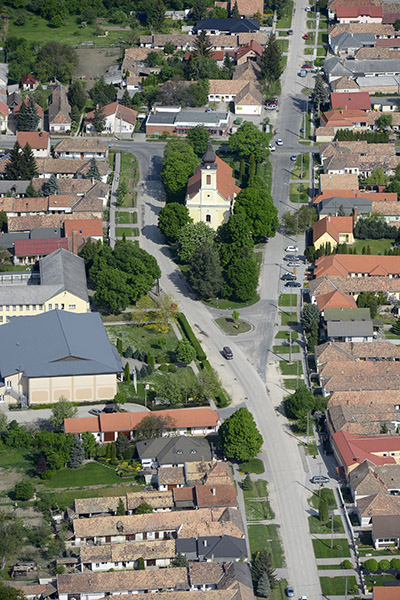 Tarjáni Római Katolikus Plébánia